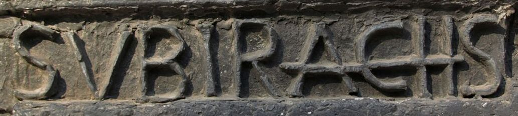 La Cara de Barcelona (Josep María Subirachs, 1963)